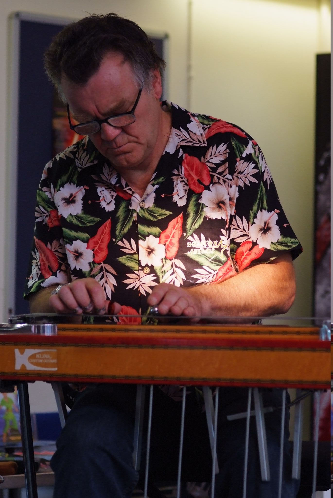 B.J. Cole (steel guitarist)